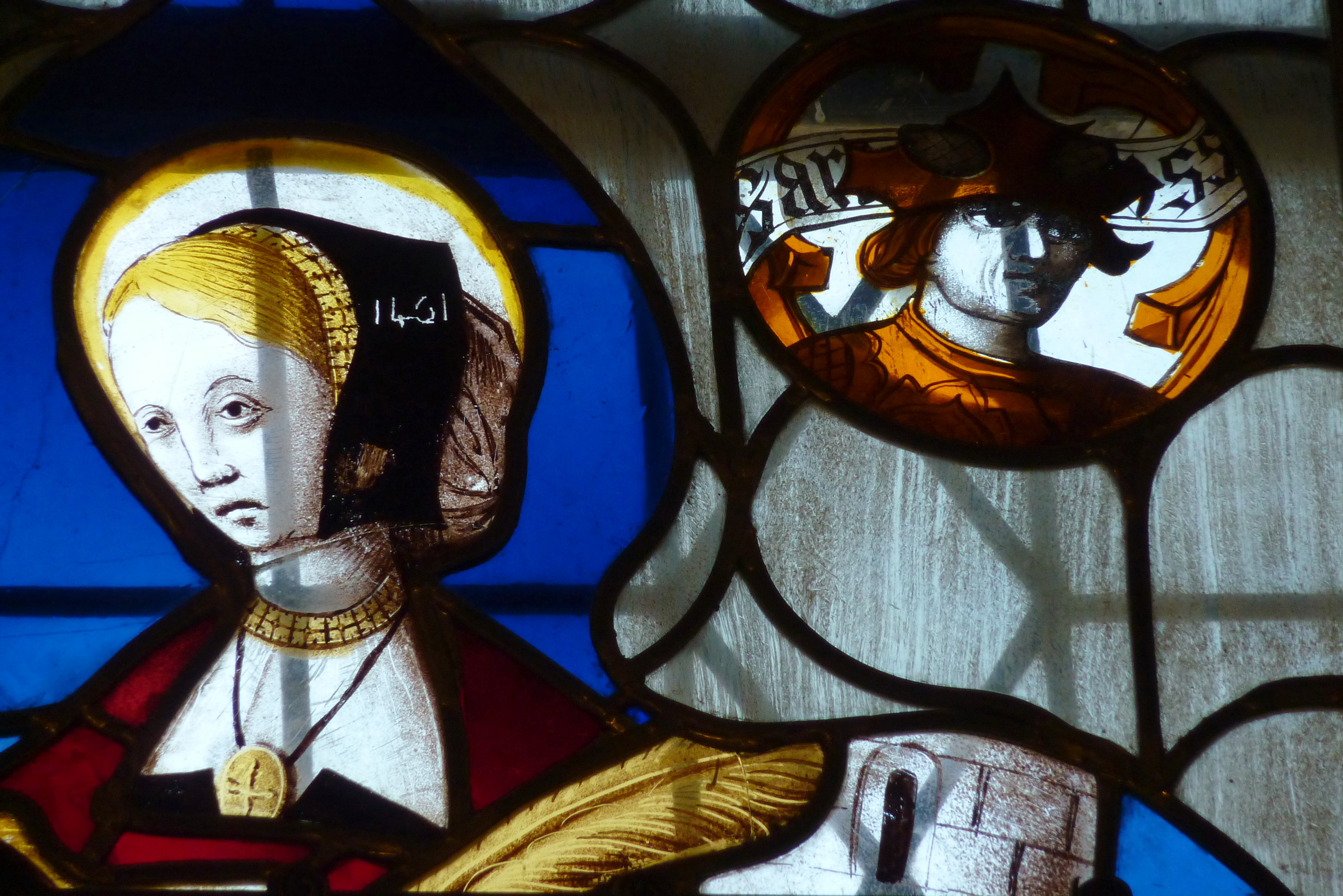 Palais Rihour in Lille im Département Nord (Nord-Pas-de-Calais/Frankreich), Bleiglasfenster mit Fragmenten aus dem 16. Jahrhundert